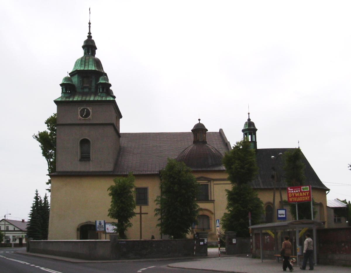 Kęty lengyel város román plébániatemploma